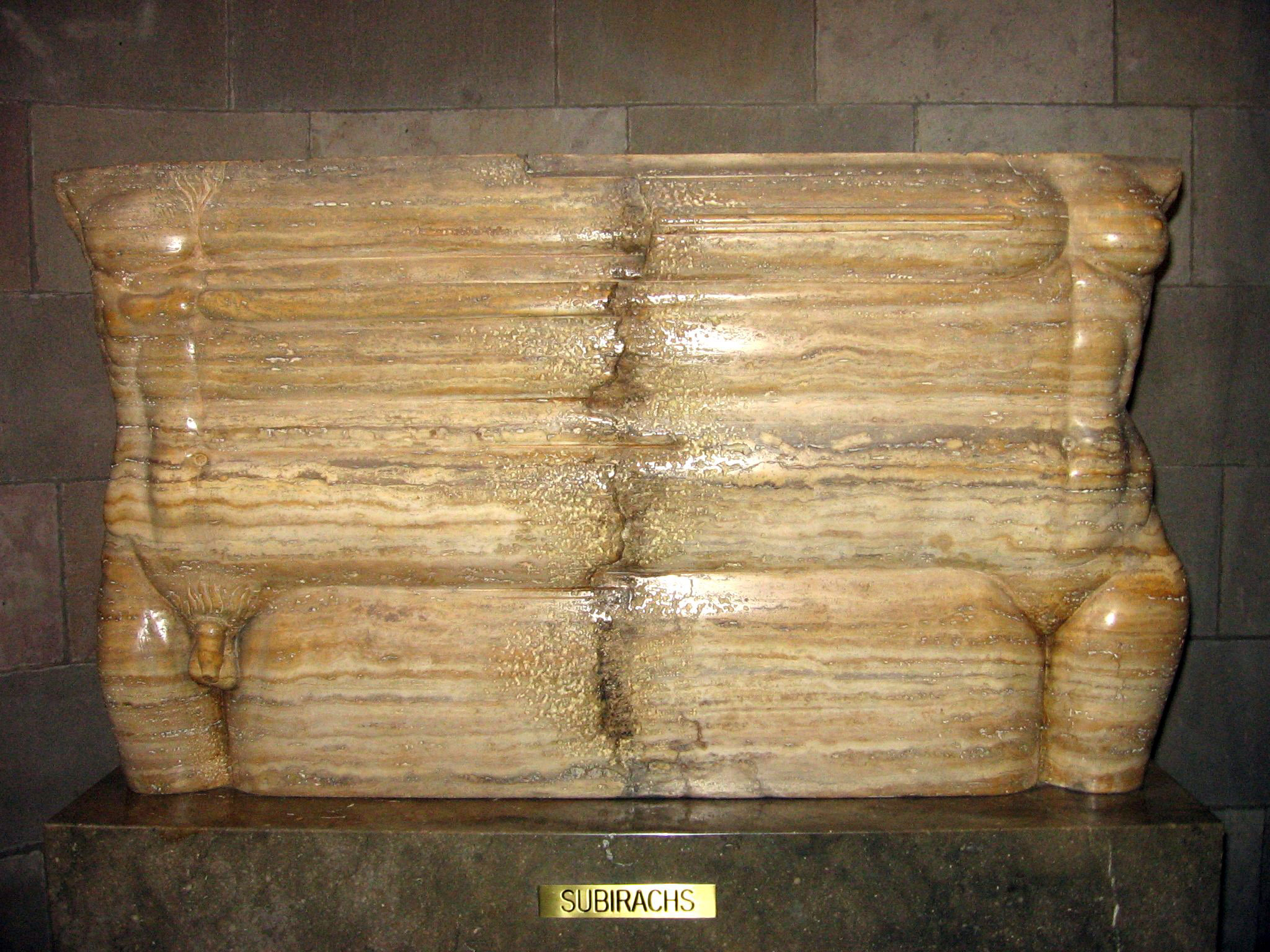 Materia-Forma, de Josep Maria Subirachs, Ayuntamiento de Barcelona.